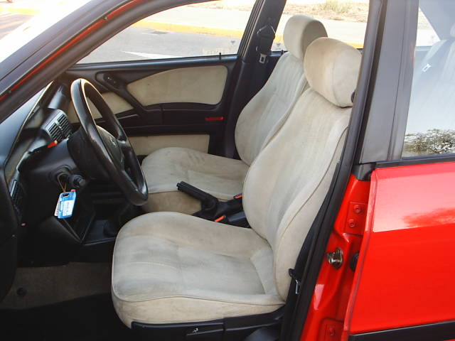 Interior Lancia Delta.